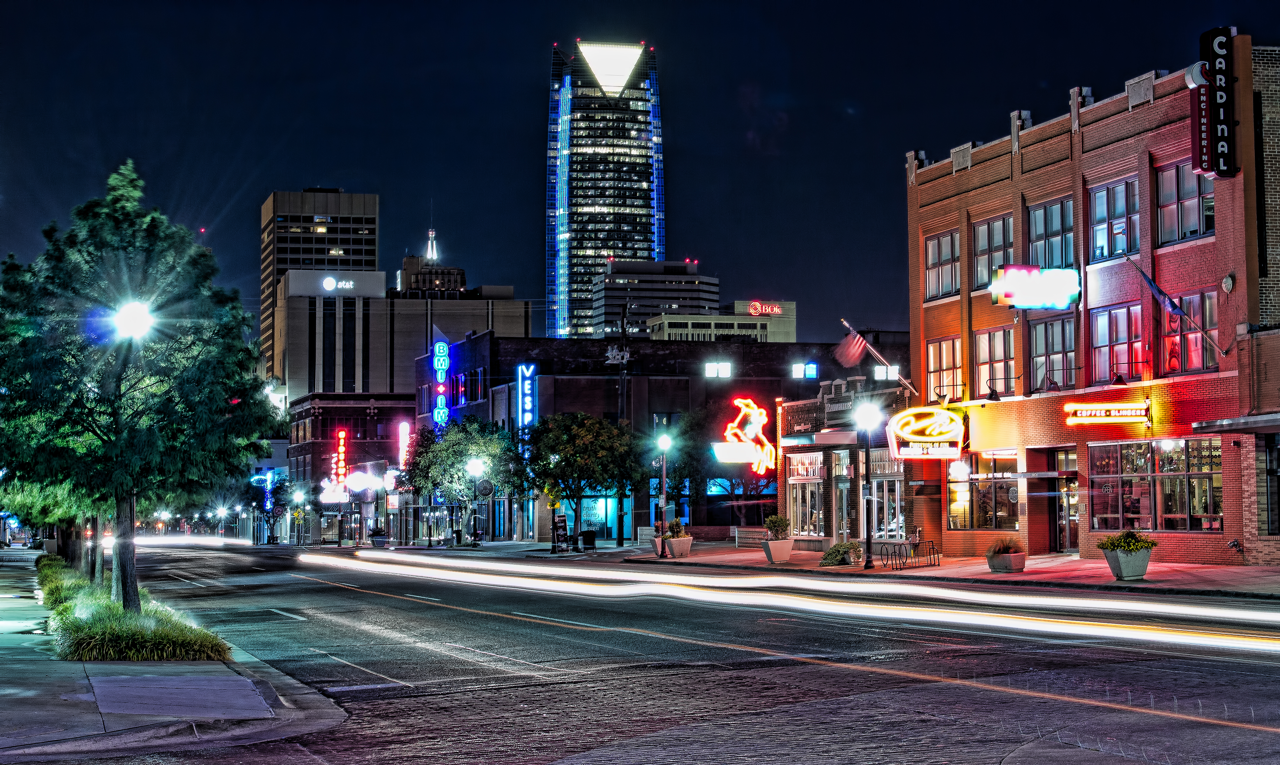 Oklahoma City, Oklahoma, U.S